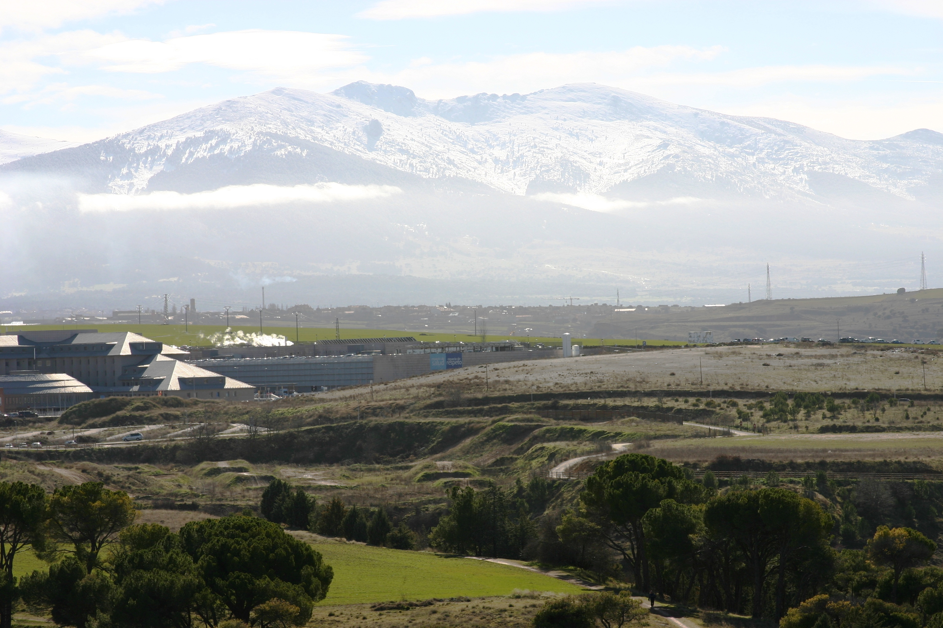 Vista das Montanhas